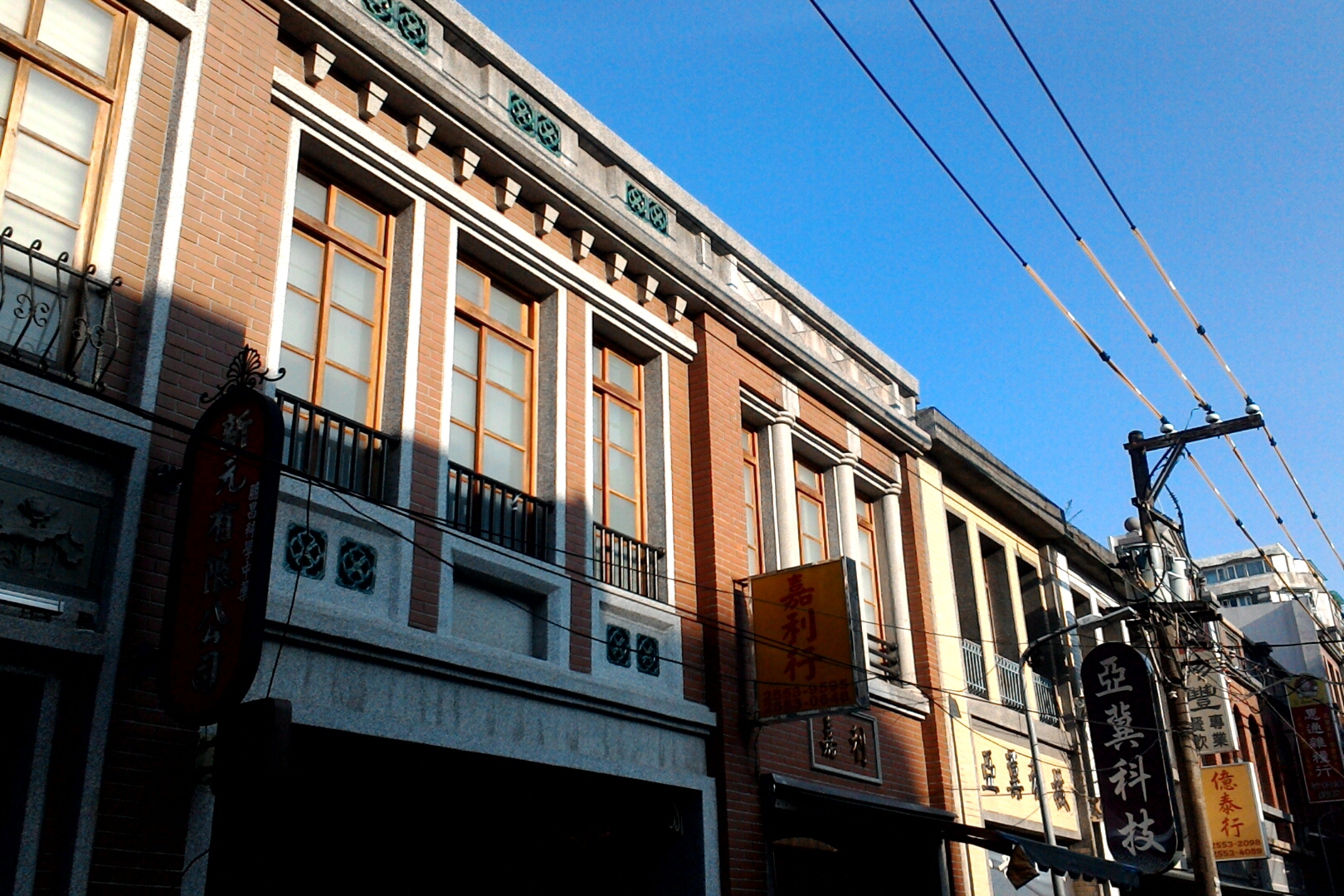 嘉利行與亞冀科技,台北市大同區延平次分區大有里